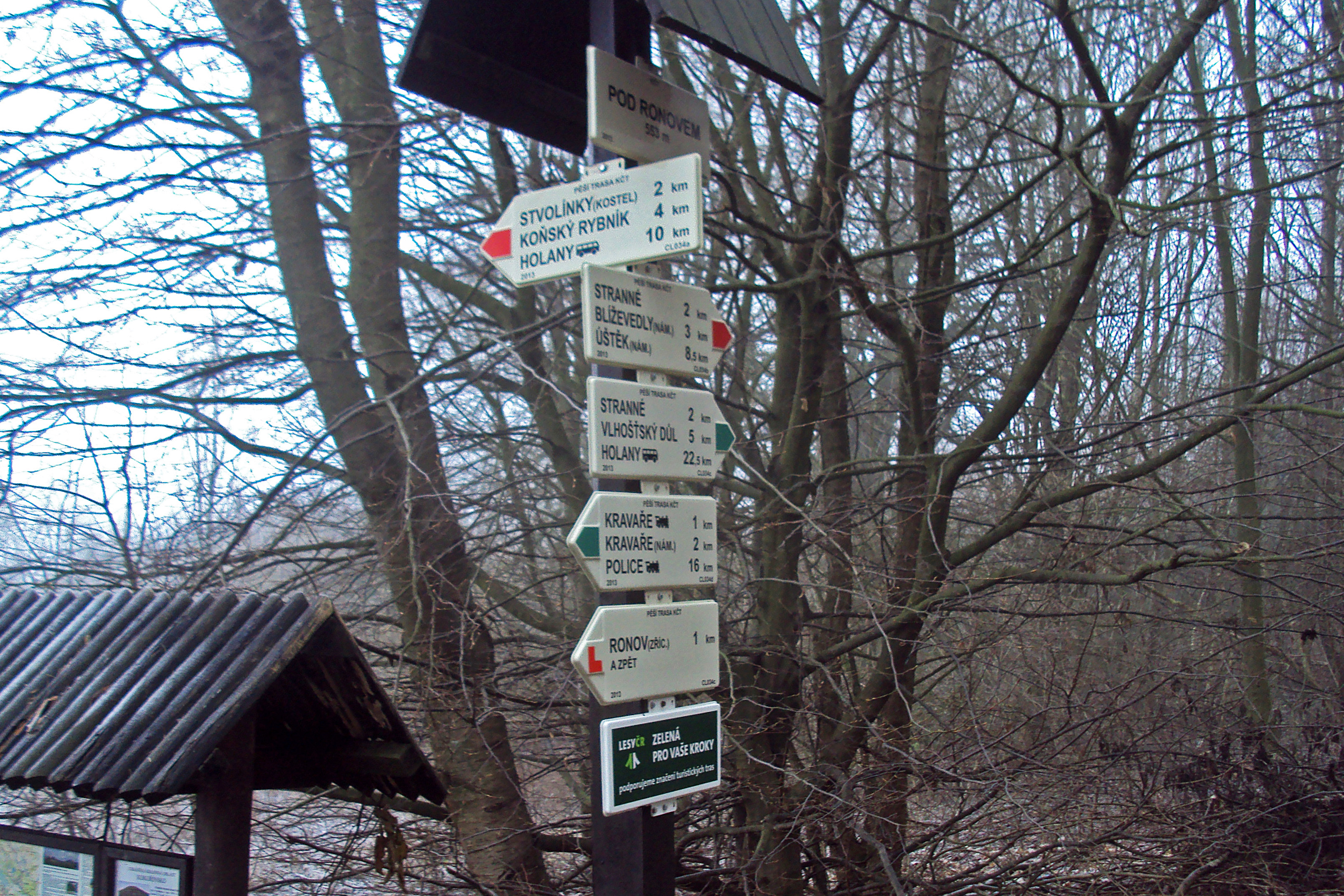 Turistický rozcestník, nové tabulky